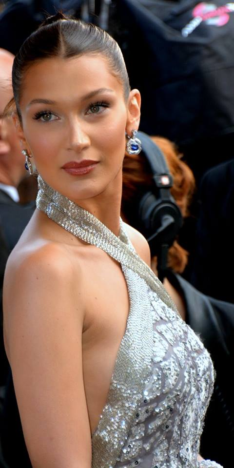 Bella Hadid au festival de Cannes.